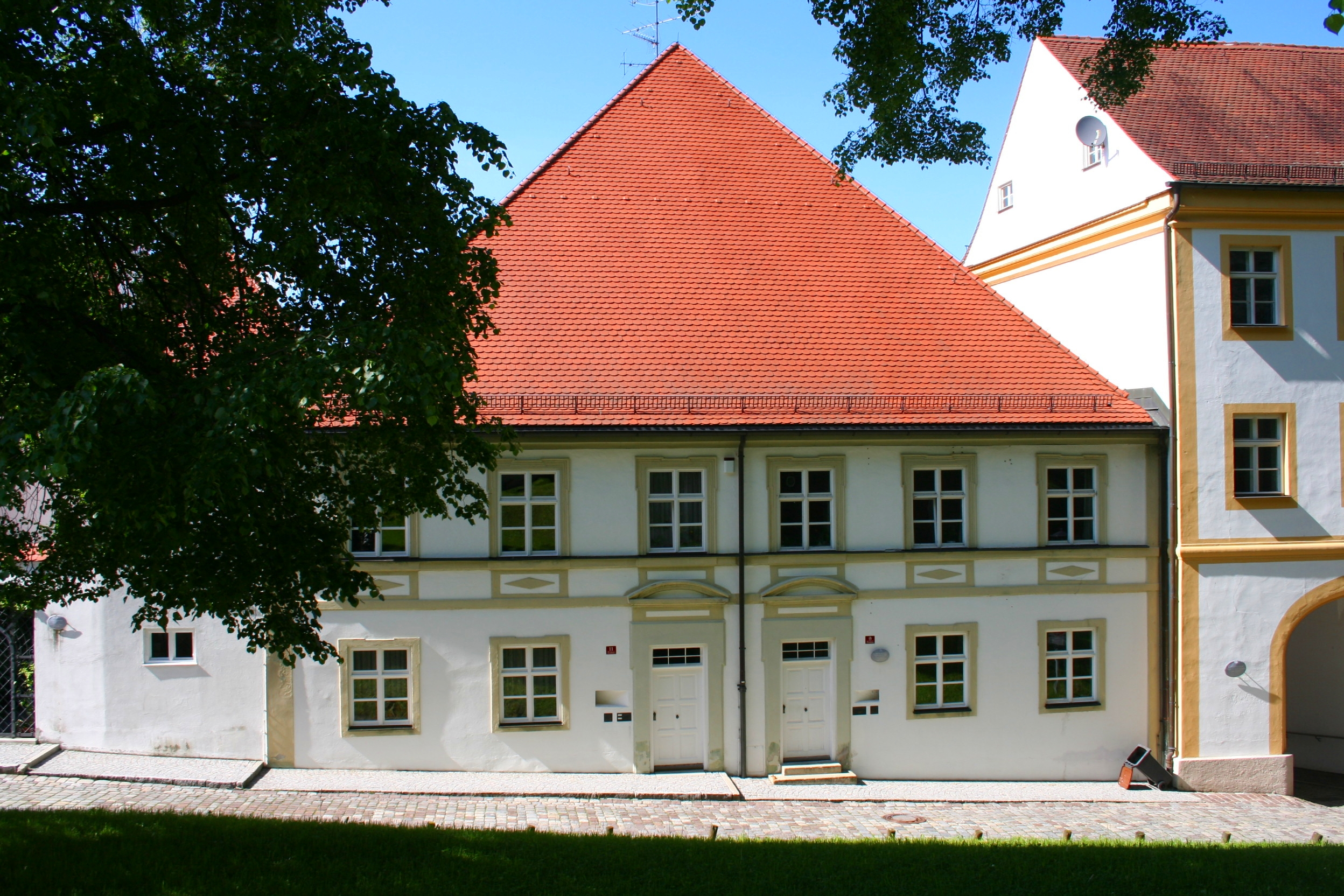 Ehemalige Domherrnhöfe des Stiftes St. Andreas, sog. Korbinian- und Nonnosushof, zweigeschossiges Doppelhaus mit Walmdach und reicher Putzgliederung, um 1670 neu erbaut.